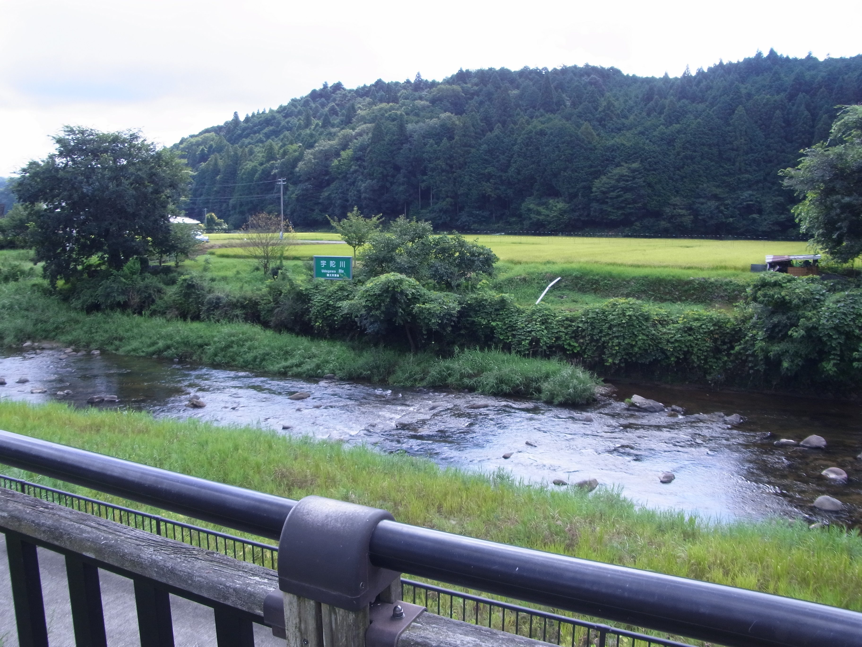 宇陀川（道の駅宇陀路室生付近）